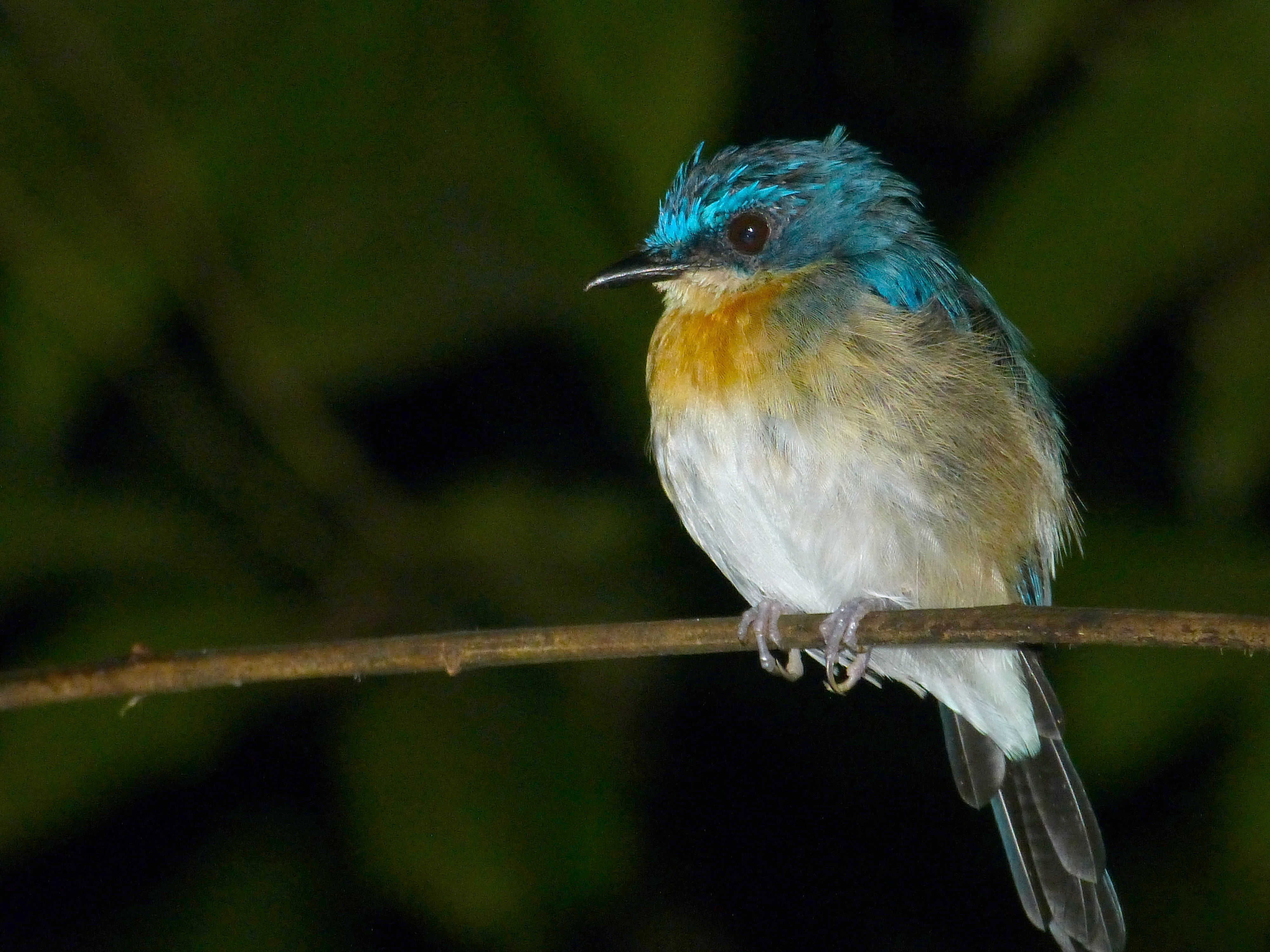 Bilit, Sabah, MALAYSIA